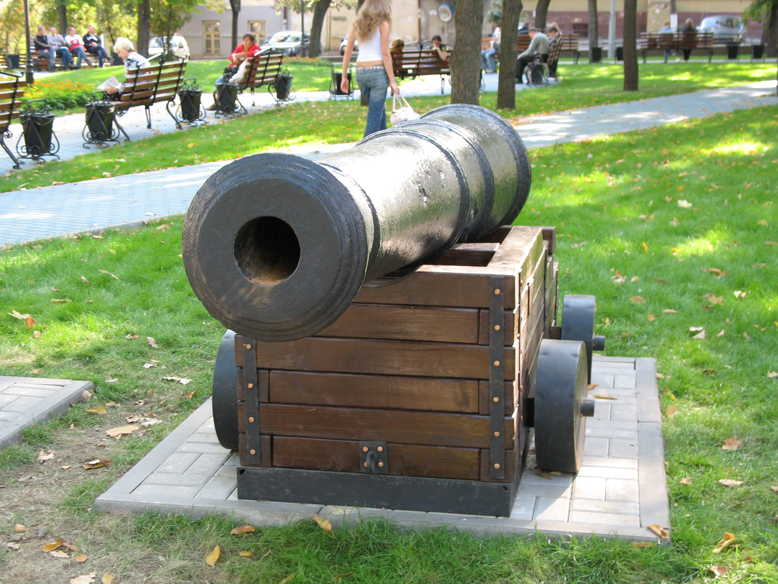 Одна из пушек в Петровском сквере. Существует версия, что они участвовали в Полтавской битве.